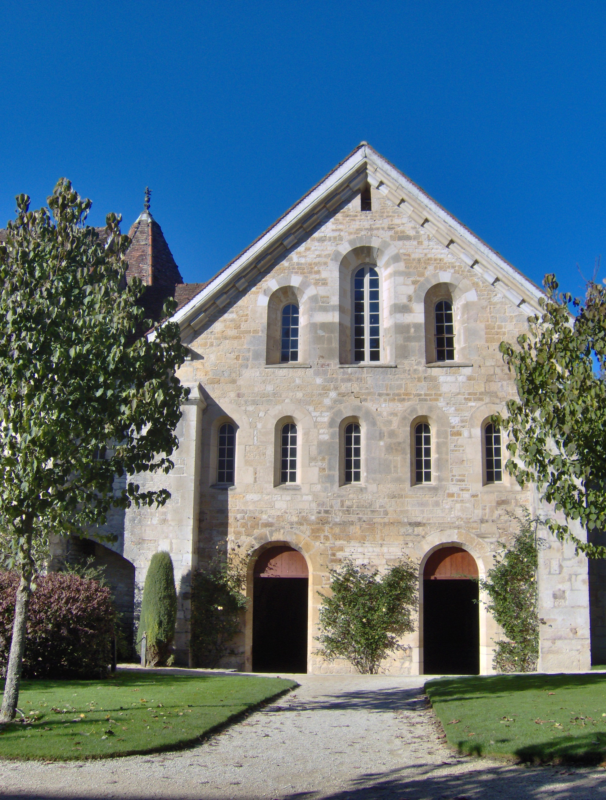 Pignon du dortoir de l'abbaye cistercienne de Fontenay à Marmagne (21).